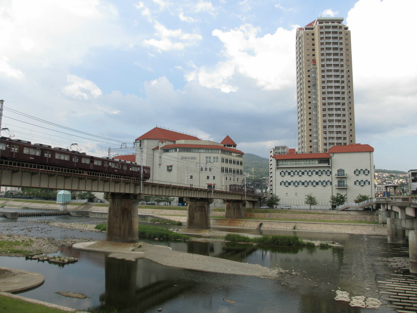 Mukogawa